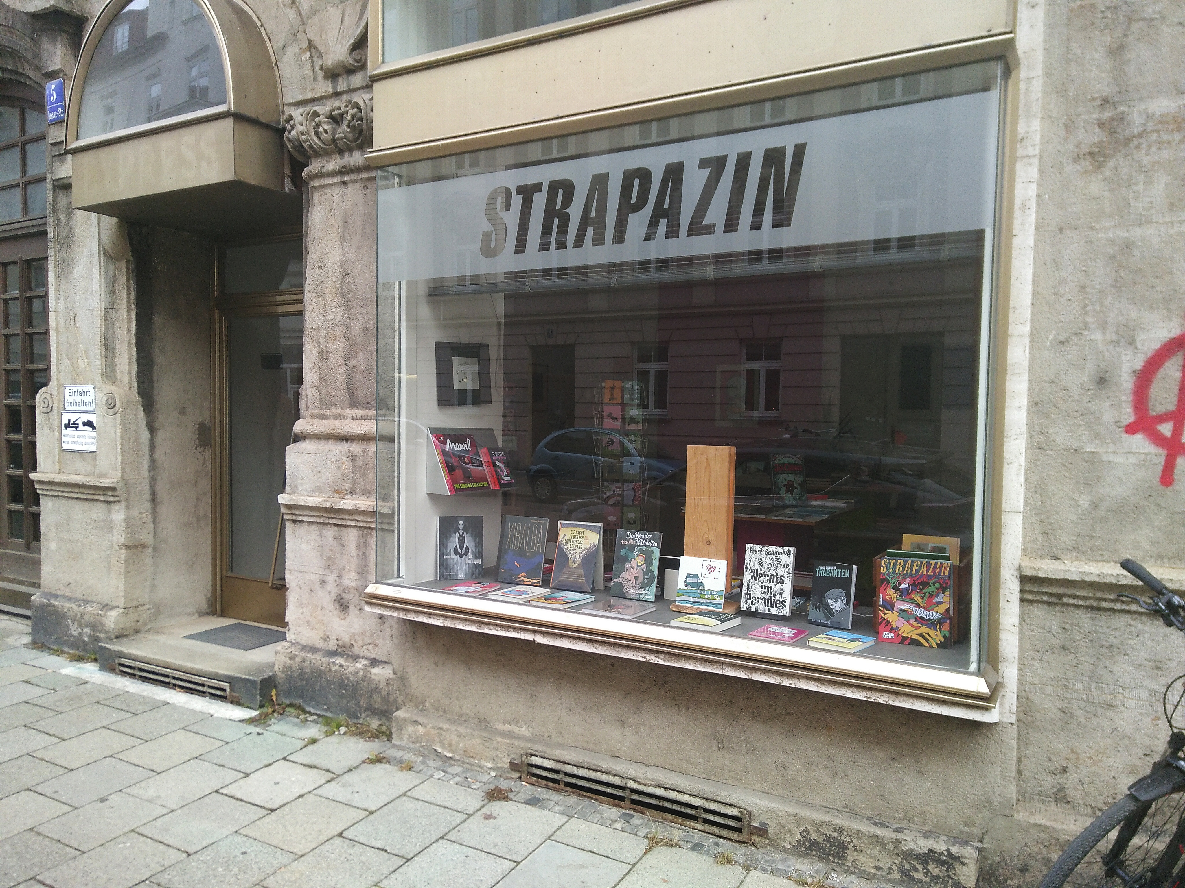 Das Strapazin-Büro in München-Sendling, Daiserstraße 5 (2019)